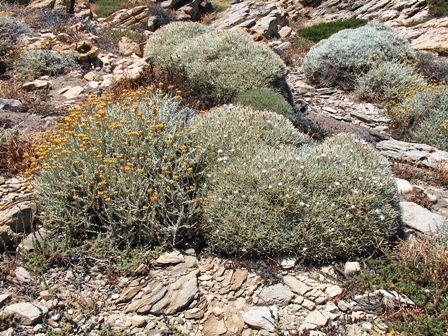 Centaurea horrida from Capo Falcone, Sardinia, Italy